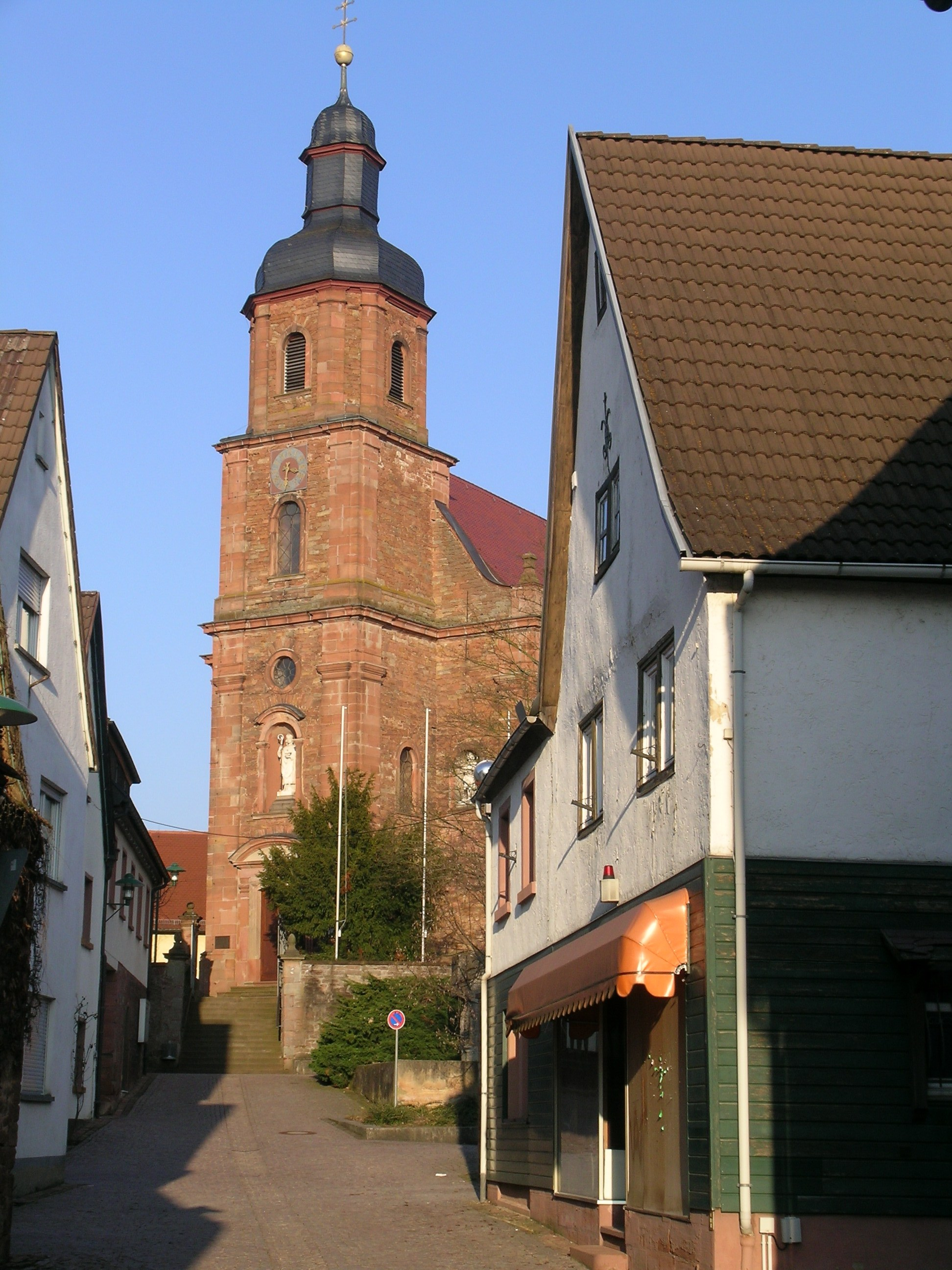 Pfarrkirche St. Martin in Mömlingen (Bayern), 1774-77